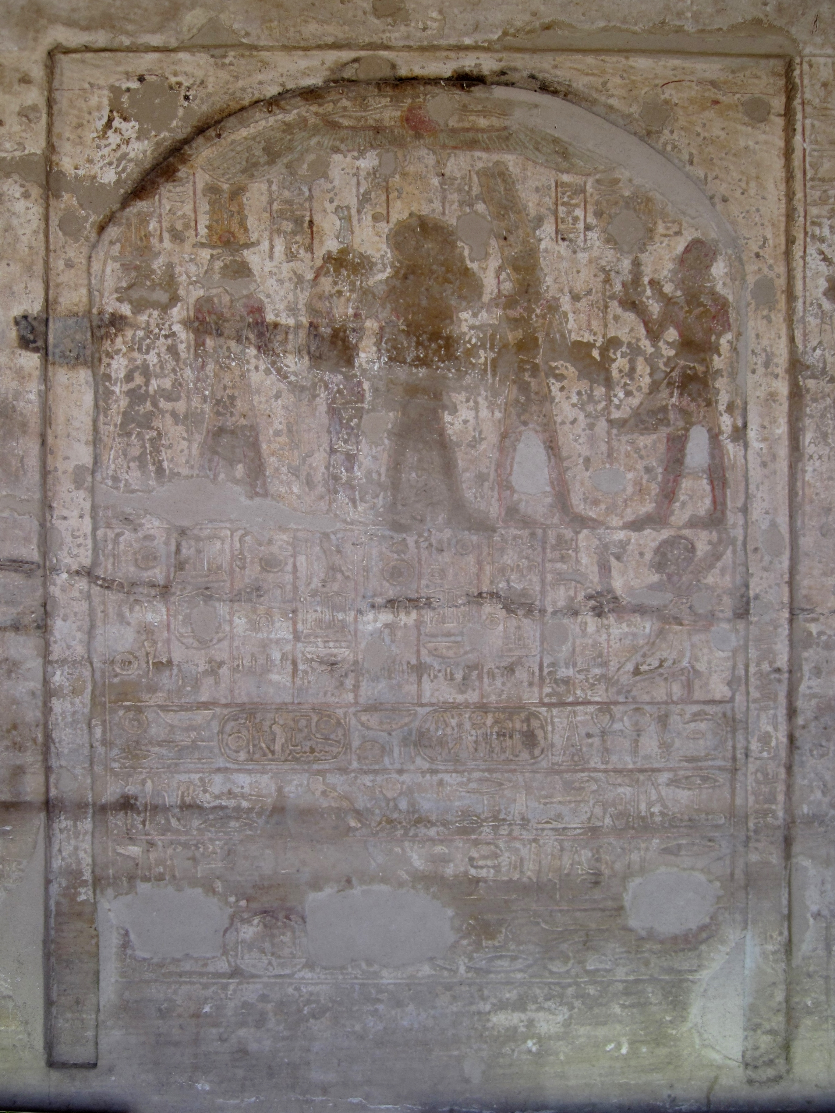 Innenraum des Felsentempels des Haremhab im Steinbruch Dschabal as-Silsila an der Westseite des Nil nördlich von Kom Ombo, Ägypten